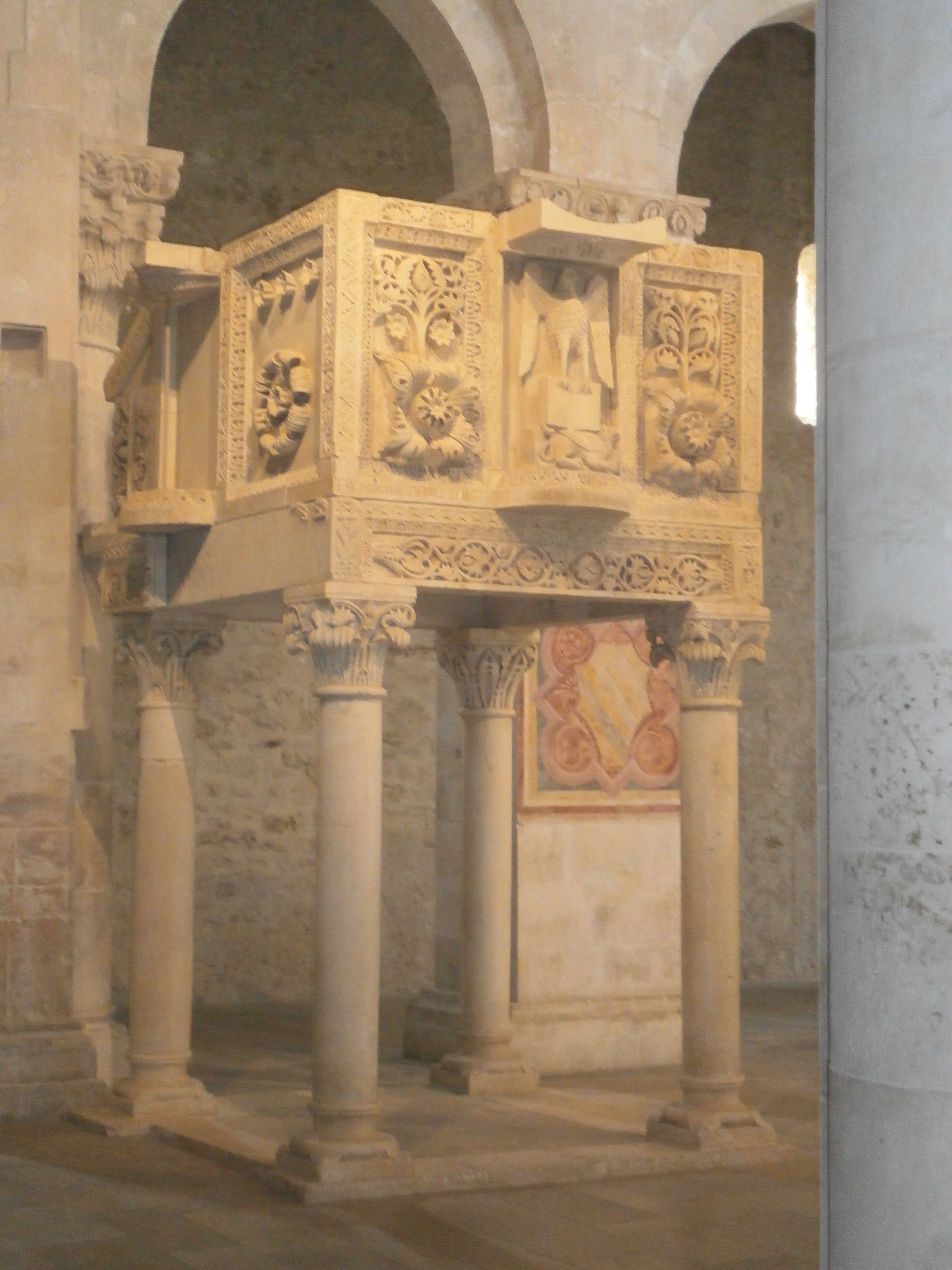 Abbazia di San Clemente a Casauria - pulpito